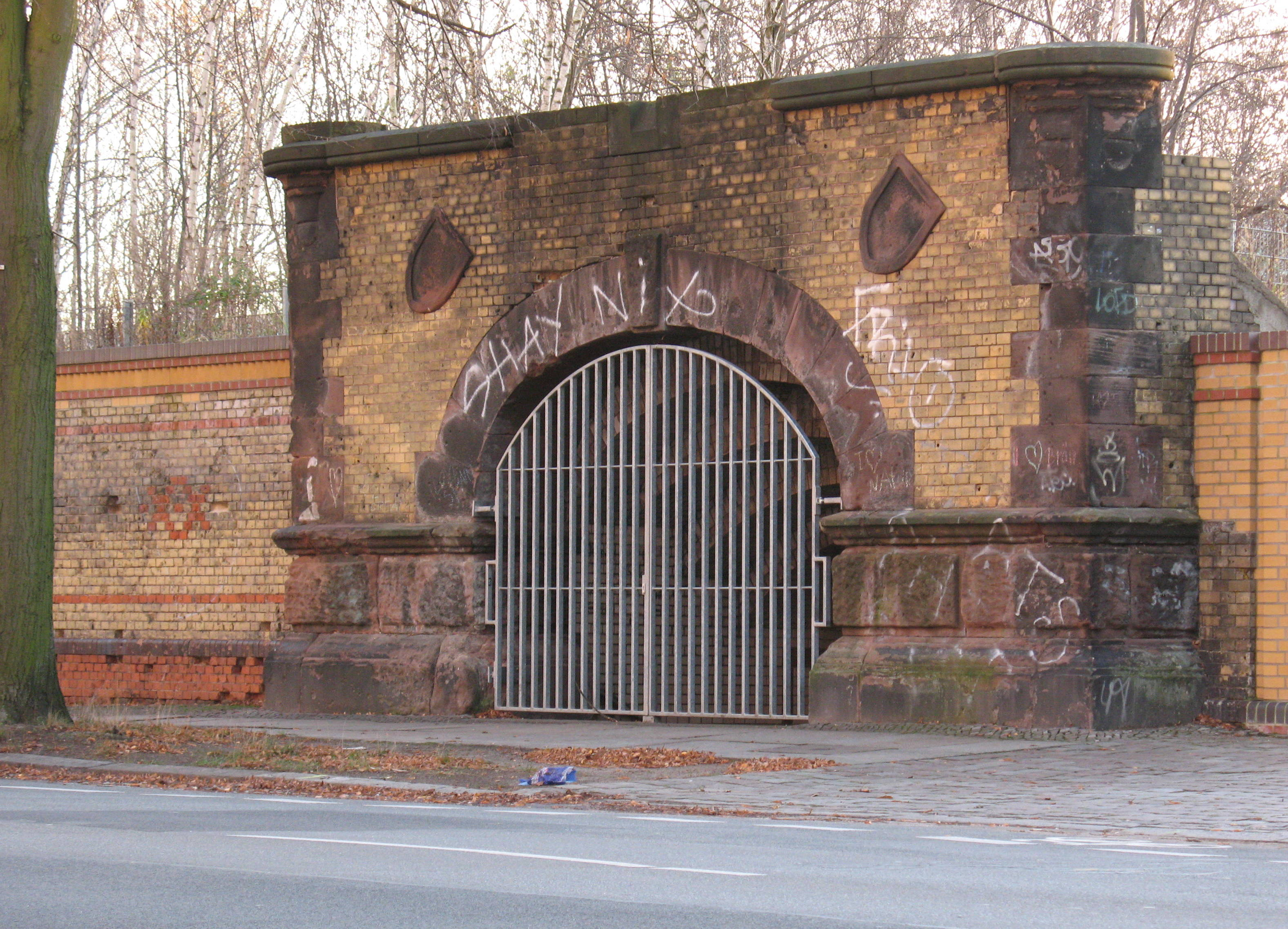 Stettiner Tunnel, 26. November 2009